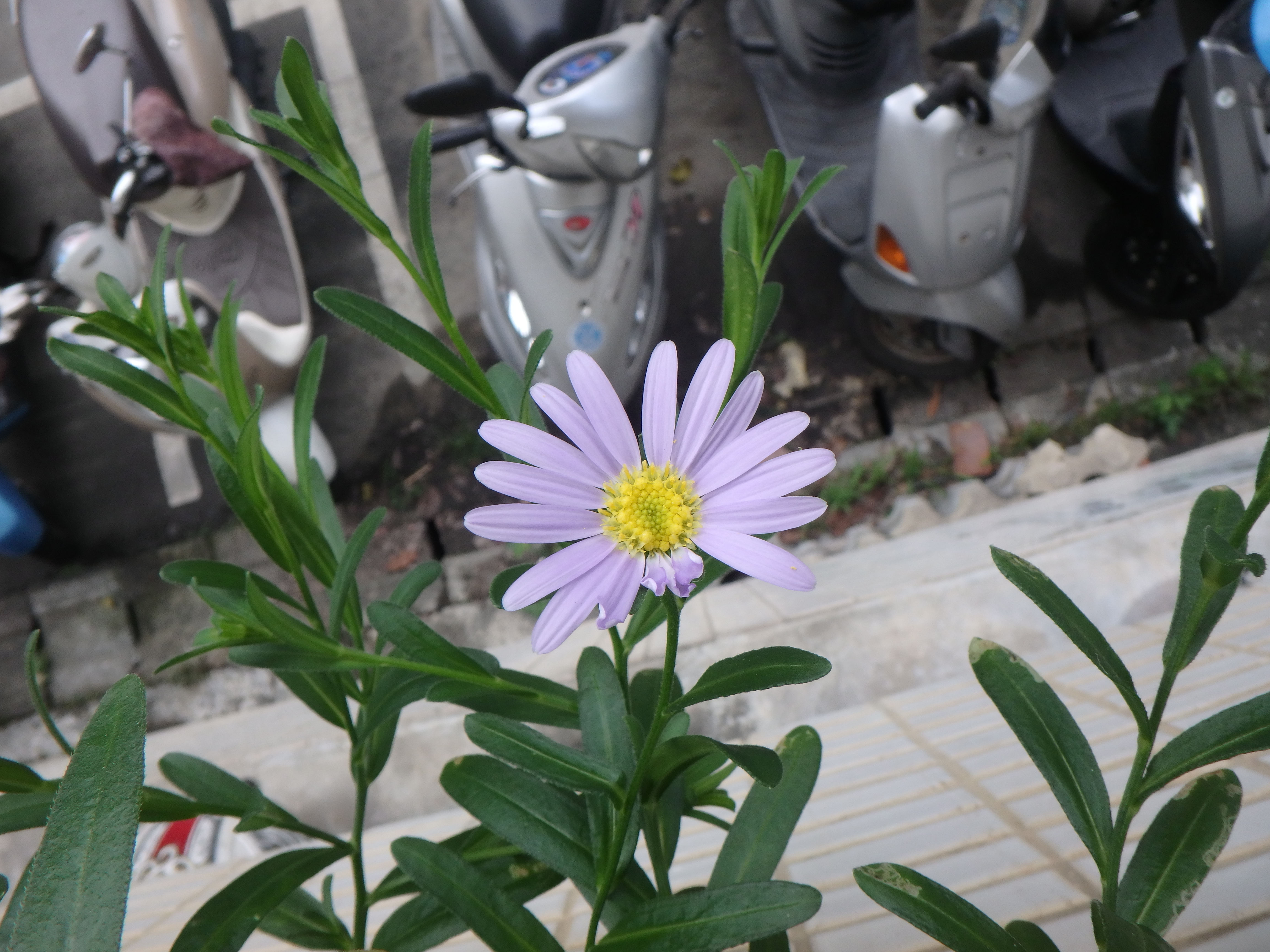 呈現淡紫色